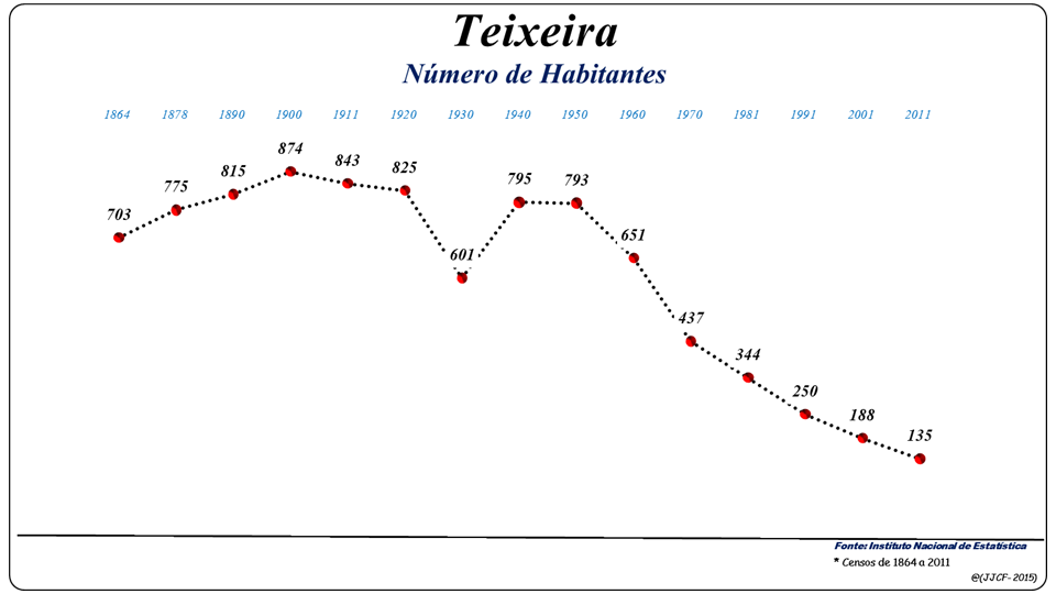 População